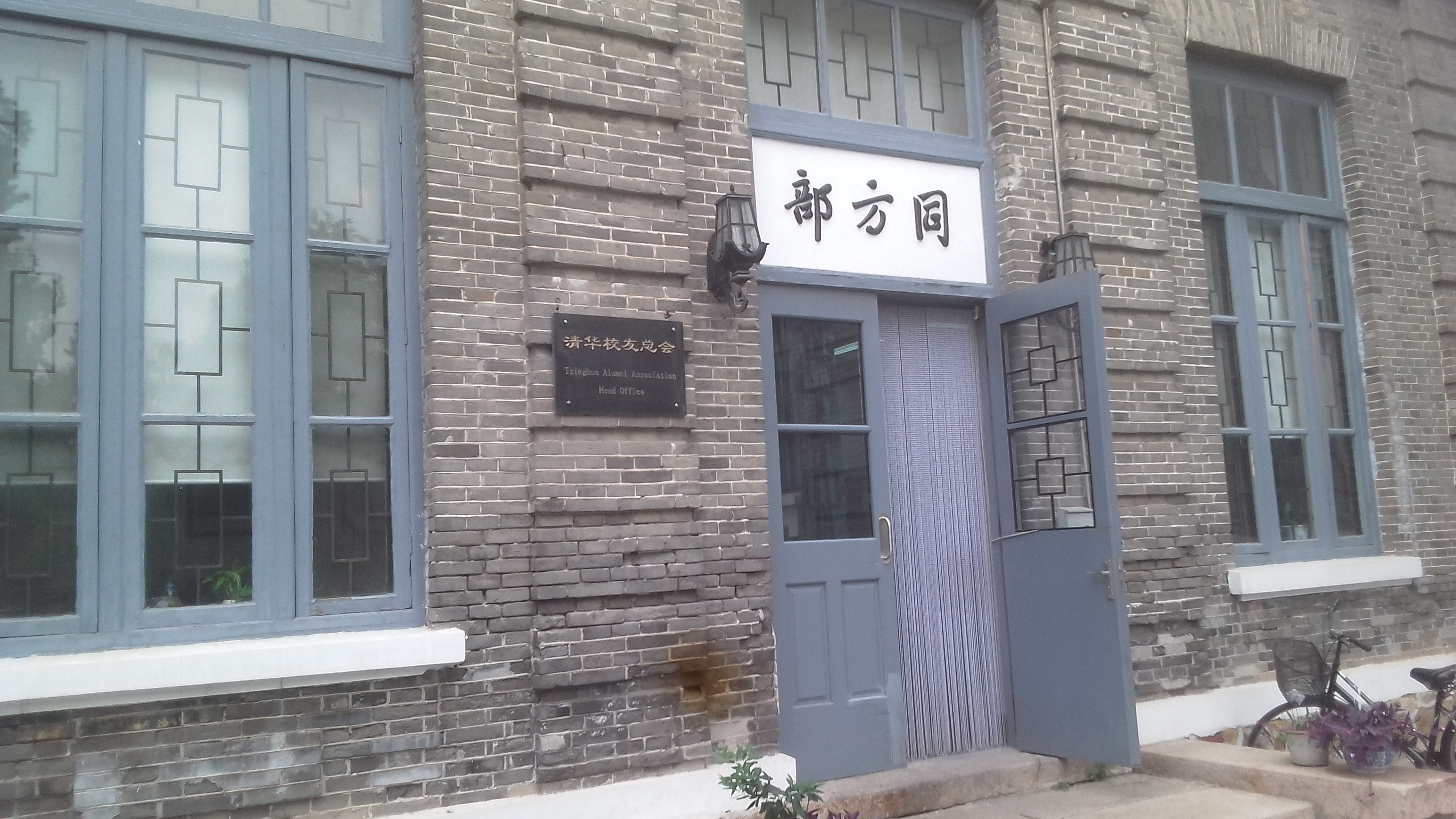 同方部 校友總會所在地